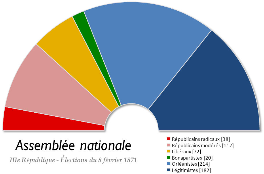 Chambre des députés française issue des élections législatives de 1871, à partir des données du Conseil constitutionnel